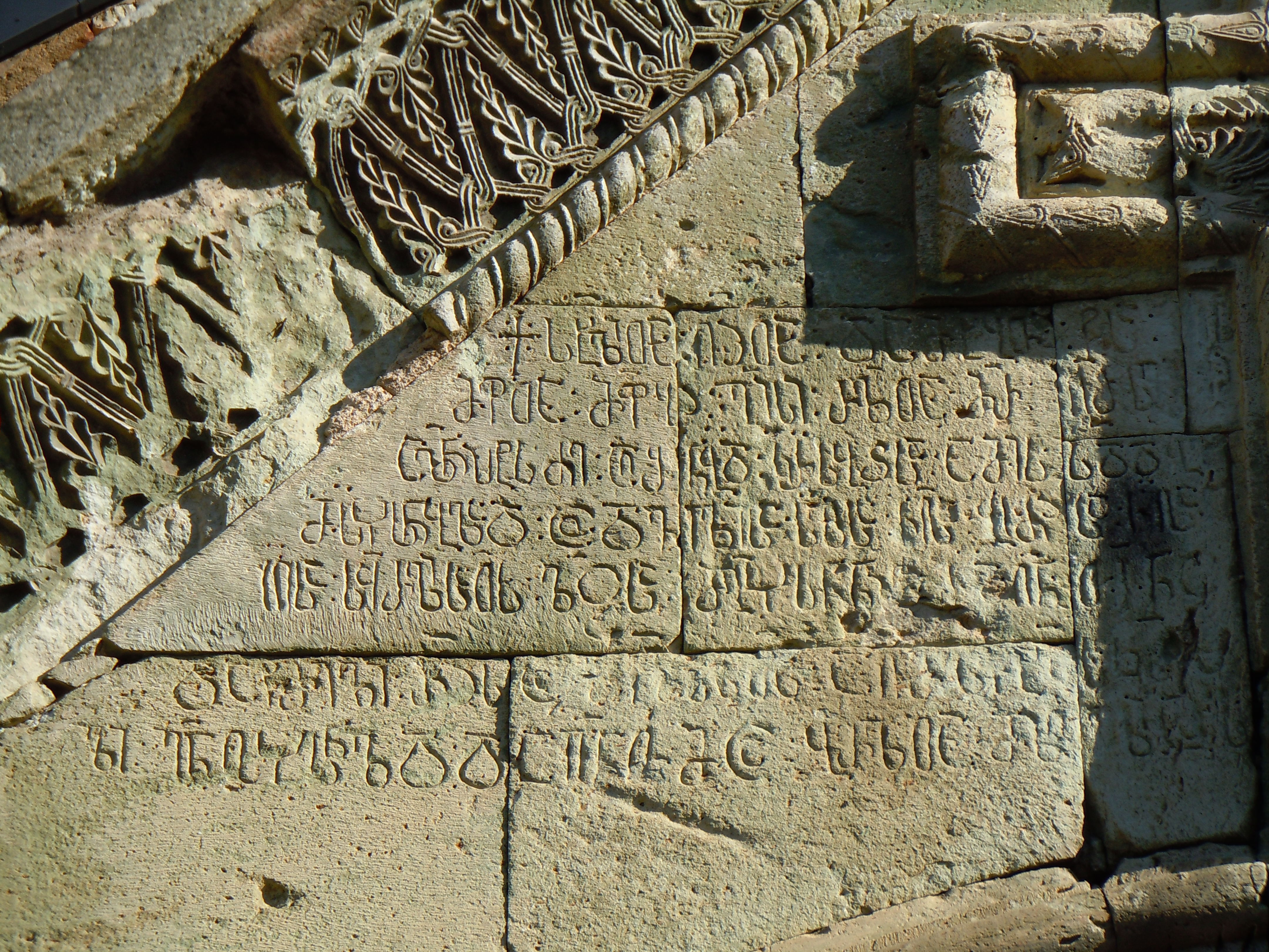 დმანისის ეზოს ეკლესია